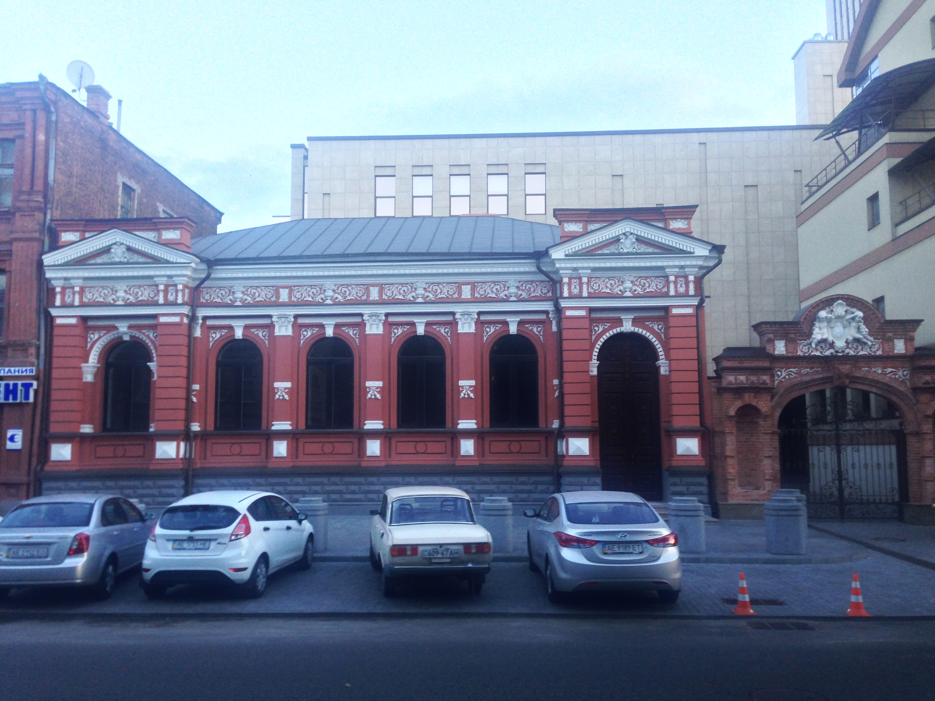 Особняк Пчолкіна, Дніпропетровськ, вул. Дем’яна Бідного, 5